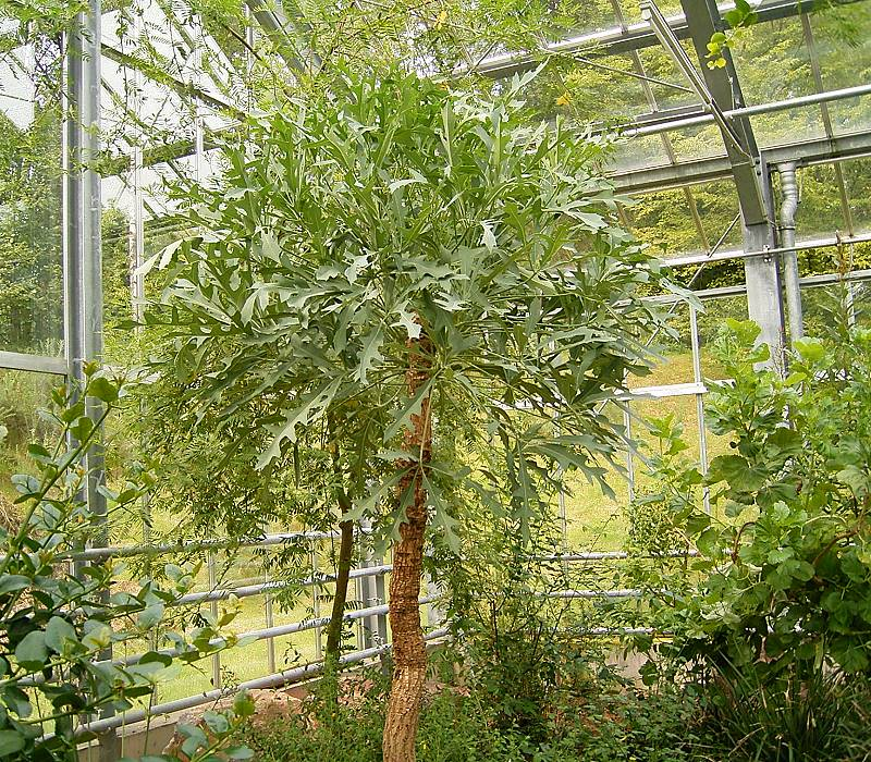 Cussonia paniculata BG Bochum, Germany